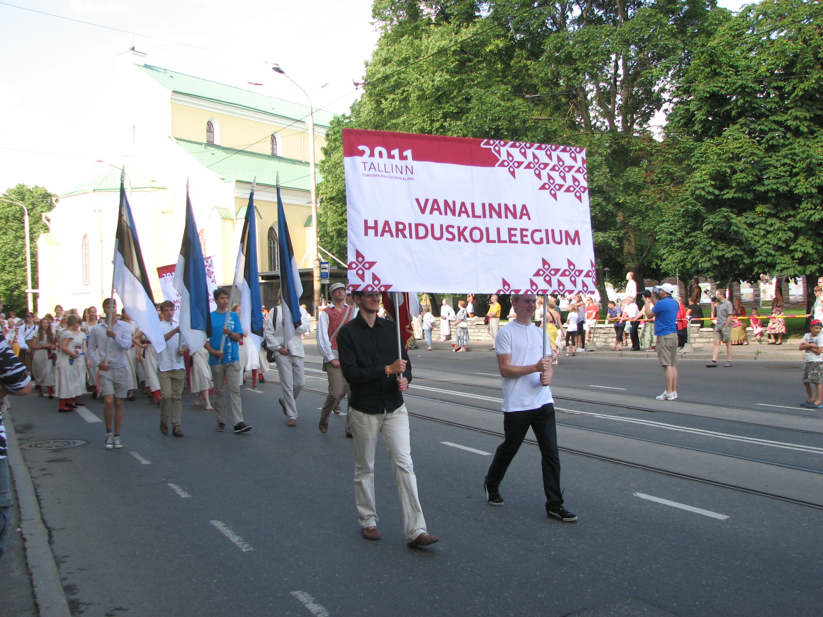 Tallinna Vanalinna Hariduskolleegiumi esindus XI noorte laulu- ja tantsupeol